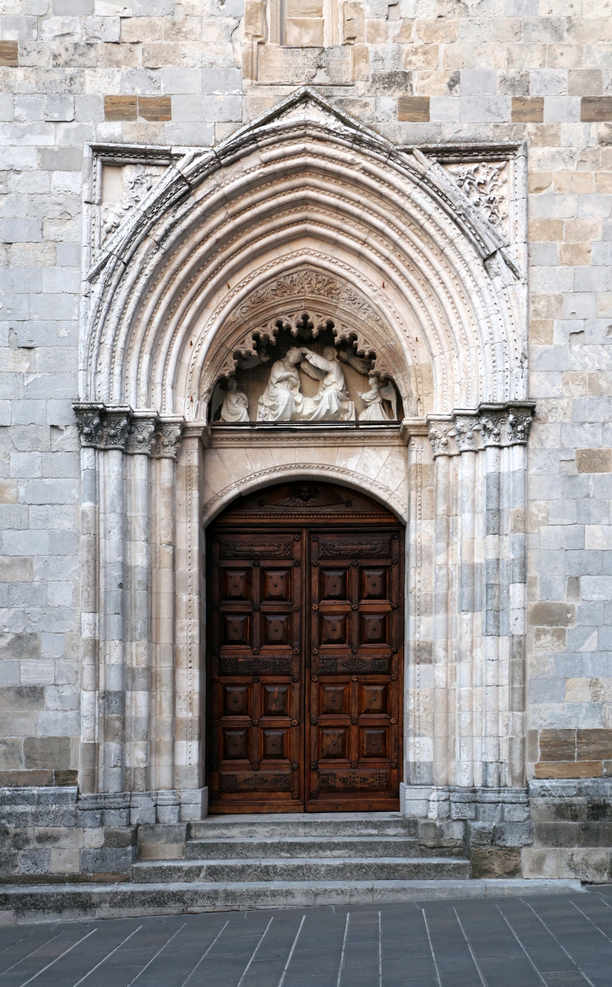 Piazza Santa Maria Maggiore This is a photo of a monument which is part of cultural heritage of Italy.